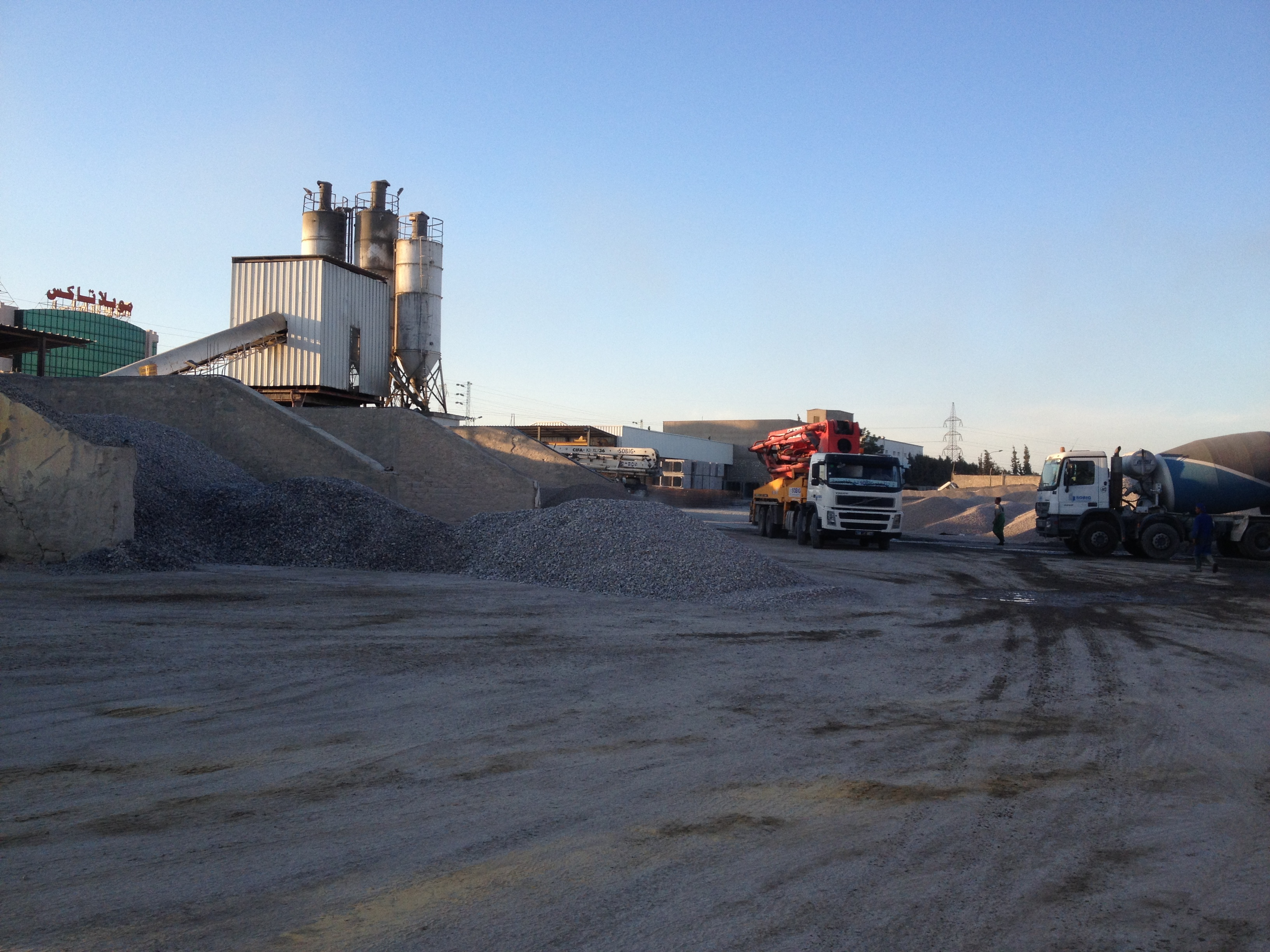 ENTREPRISE GLOULOU MOHAMED ET SALEM TUNISIA (M'SAKEN)